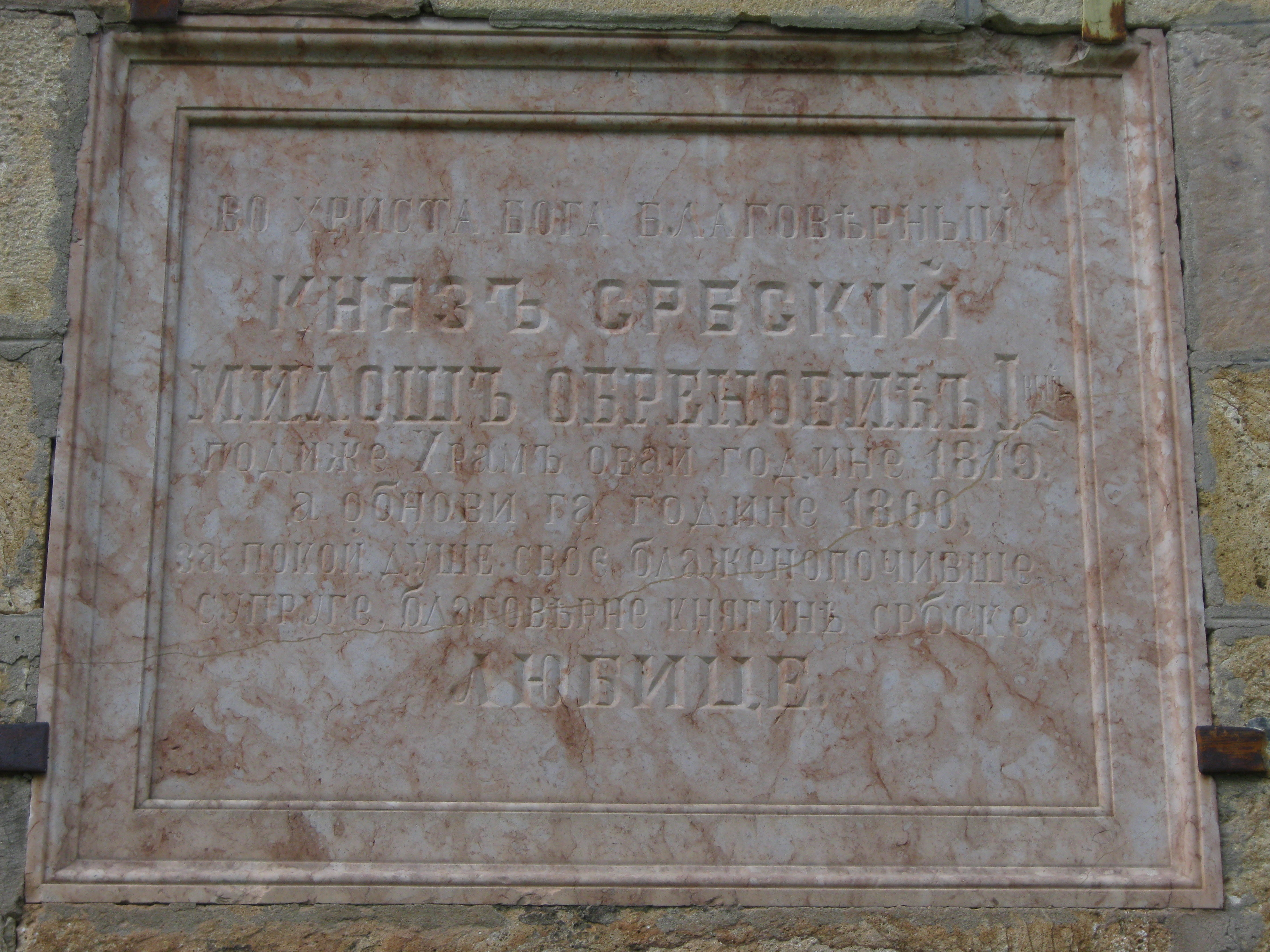 Детаљи из порте и са фасаде. Црква светог Саве на Савинцу је православна црква у Шаранима, епархија жичка, подигнута 1819. године и води се као споменик културе у категорији културно добро од великог значаја. Њен ктитор је кнез Милош Обреновић. Цркву је кнез Милош саградио у знак захвалности за победу на Љубићу.